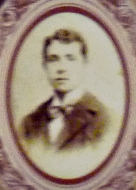 Retrato de Francisco Durini Cáceres, tomado de la exposición "Los Durini: Artífices del rostro moderno de Quito", del Museo de la Ciudad, Quito DM.